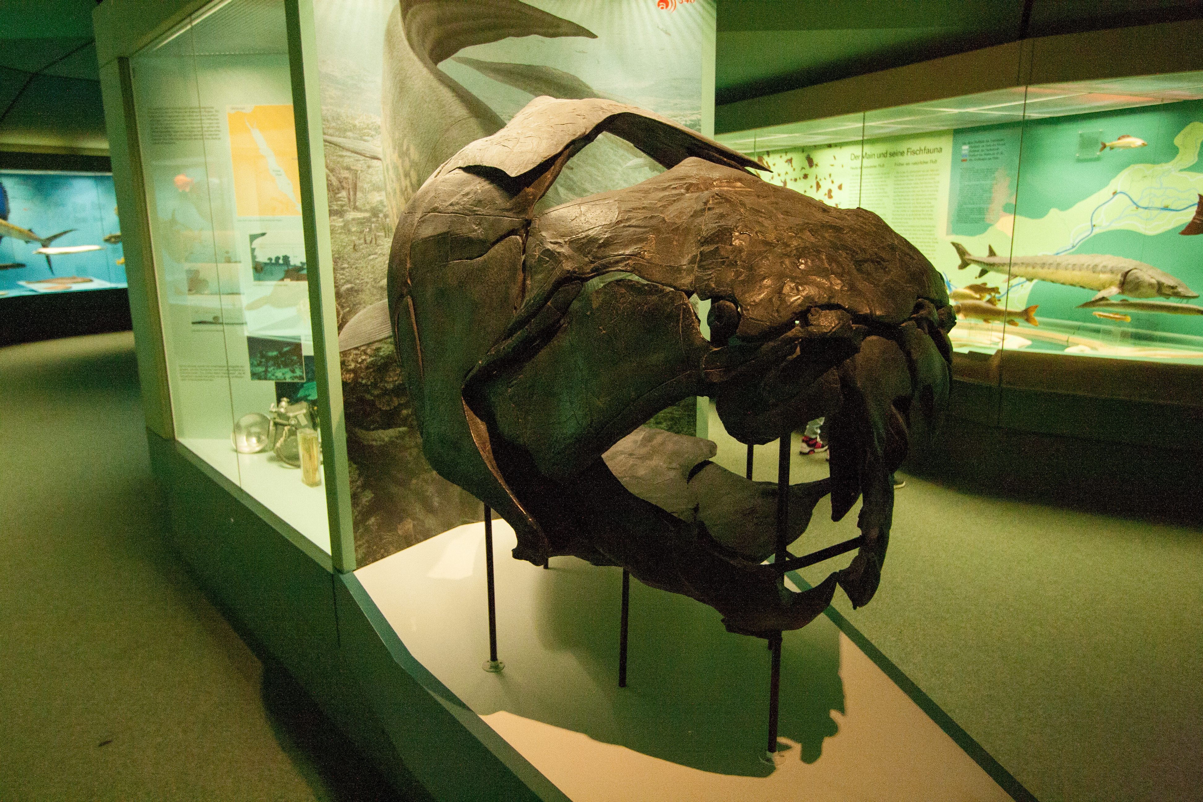 Dunkleosteus